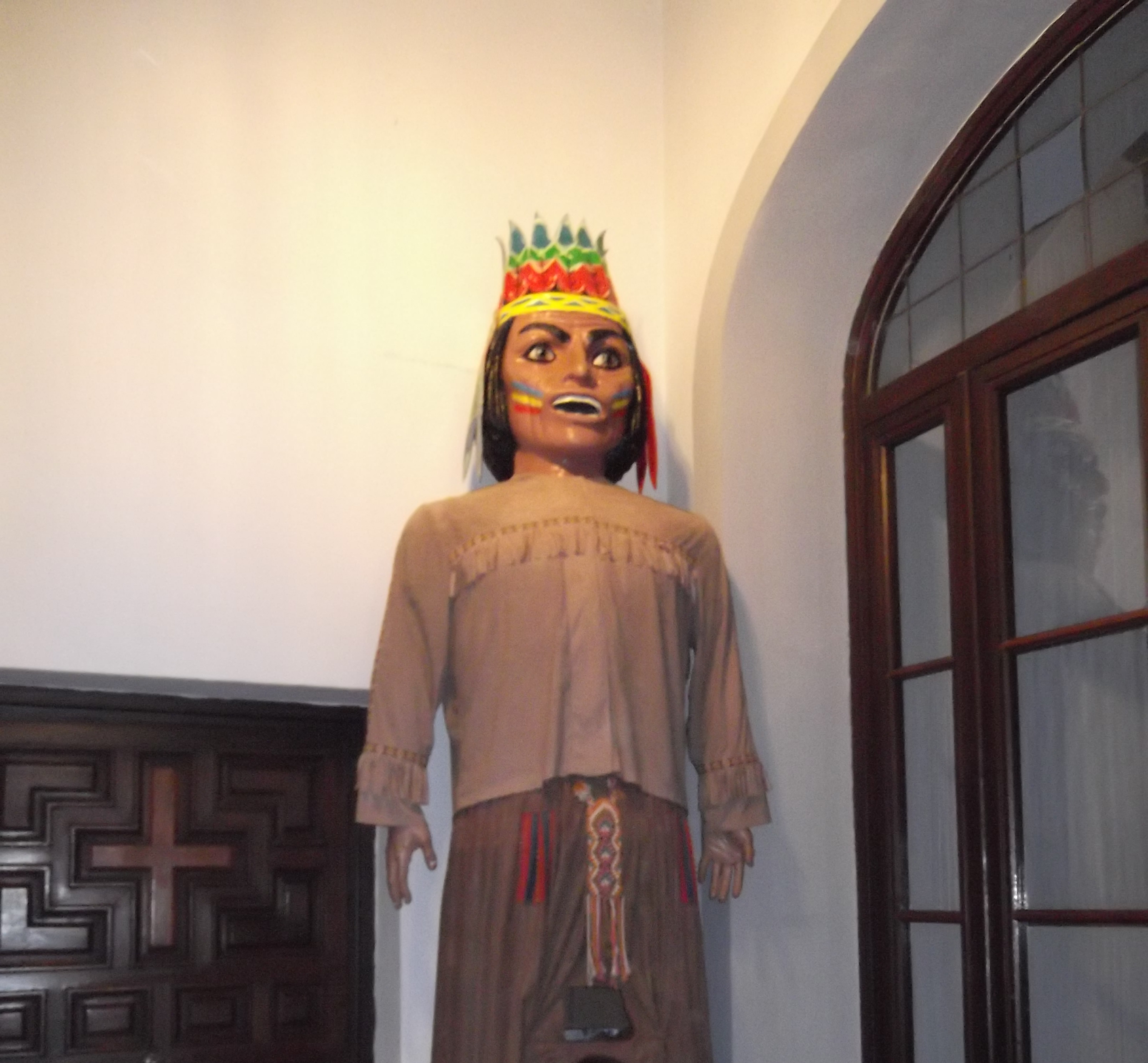 Gigantes Alcalá de Henares